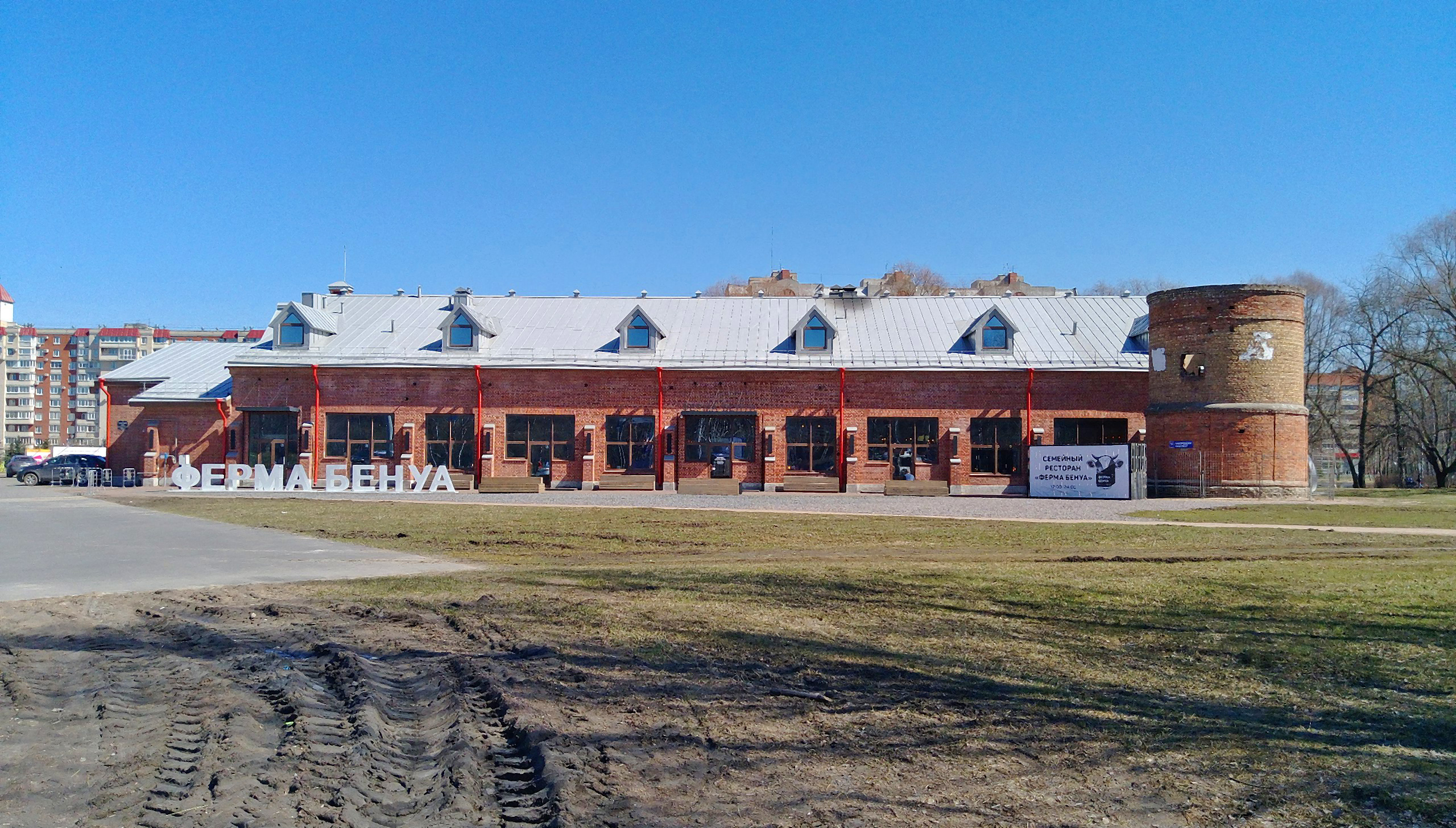 Парк Сосновка - истоки Муринского ручья (парк Сосновка, сад Бенуа и долина Муринского ручья): парк Сосновка, ограниченный проспектами Северным, Луначарского, Светлановским, Тореза, а также улицей Есенина; сад Бенуа на углу Тихорецкого и Светлановского проспектов; Муринский ручей на участке от Муринской дороги до улицы Руставели. Муринский парк не включен, ru-spb, Выборгский район, Санкт-Петербург This image is related to the protected area of Russia number 7810020